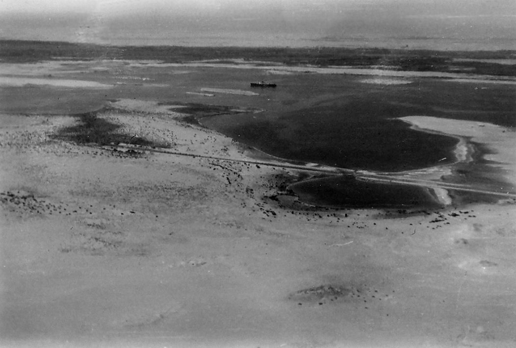 Lake Timsah and Desert